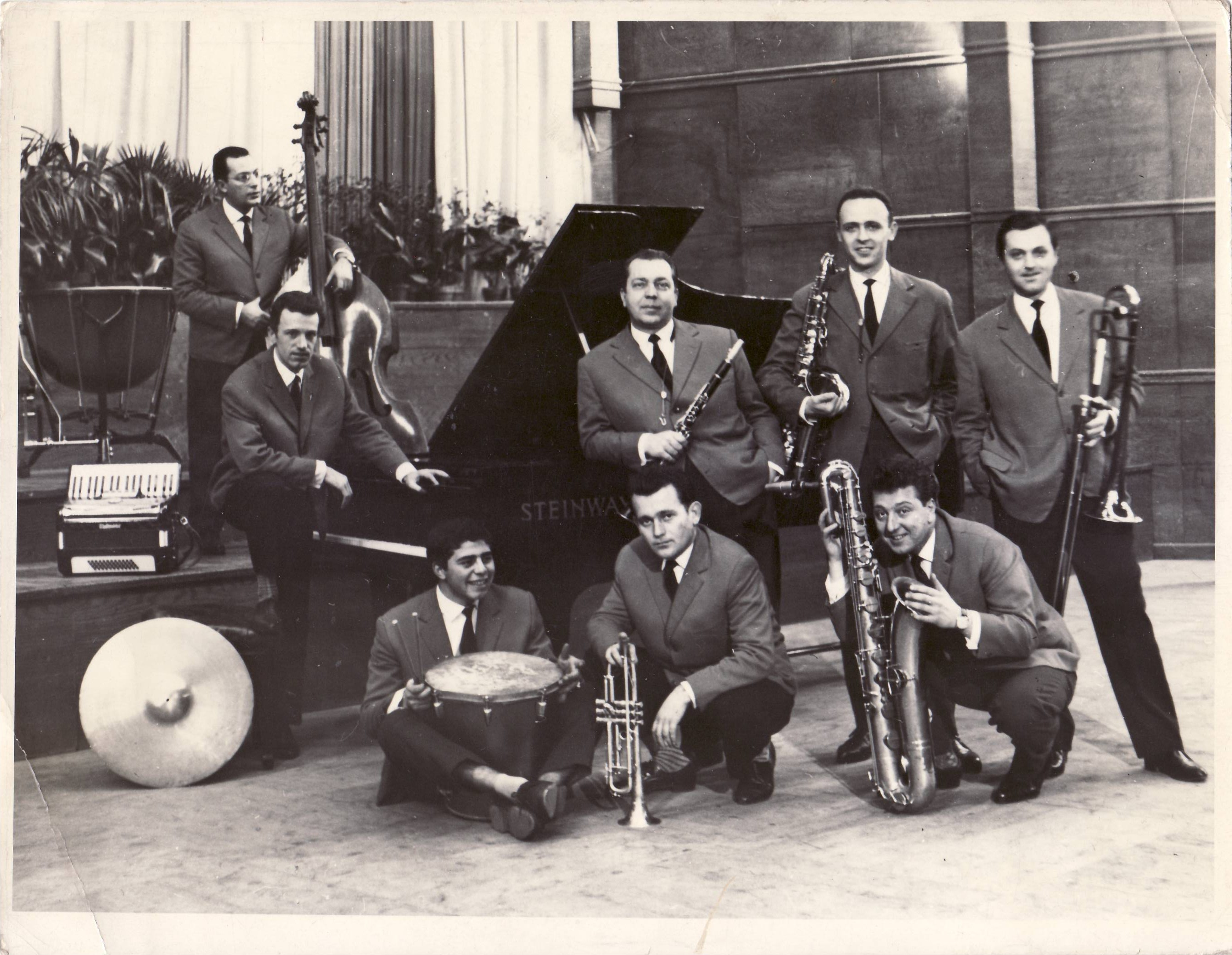 Оркестърът на Георги Ганев в зала „България” в София, 1960 г.